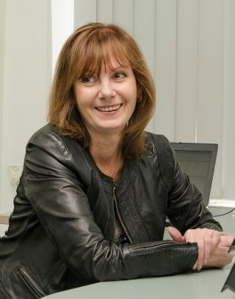 Haldi Normet-Saarna 2013. aastal Raadiomajas